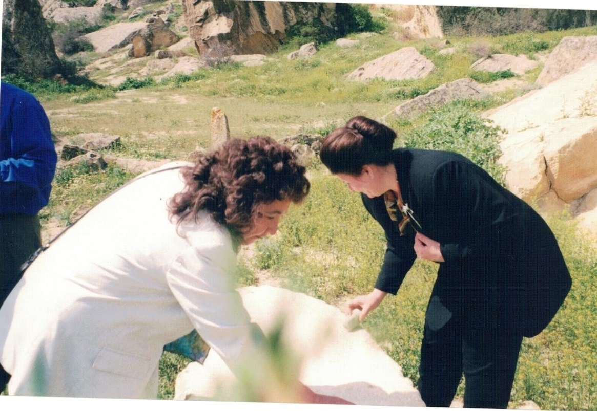 Гобустан. Камень-бубен. Ф. Хисамитдинова и Г. Ситдыкова - делегатки конференции "Деде-Коркут"